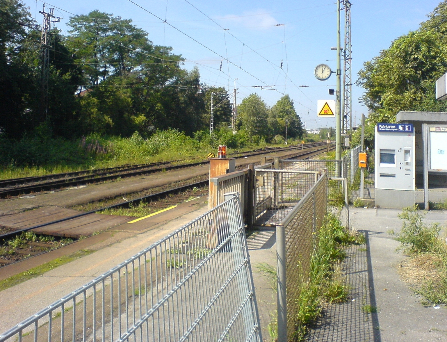 Bahnhof Dortmund-Aplerbeck